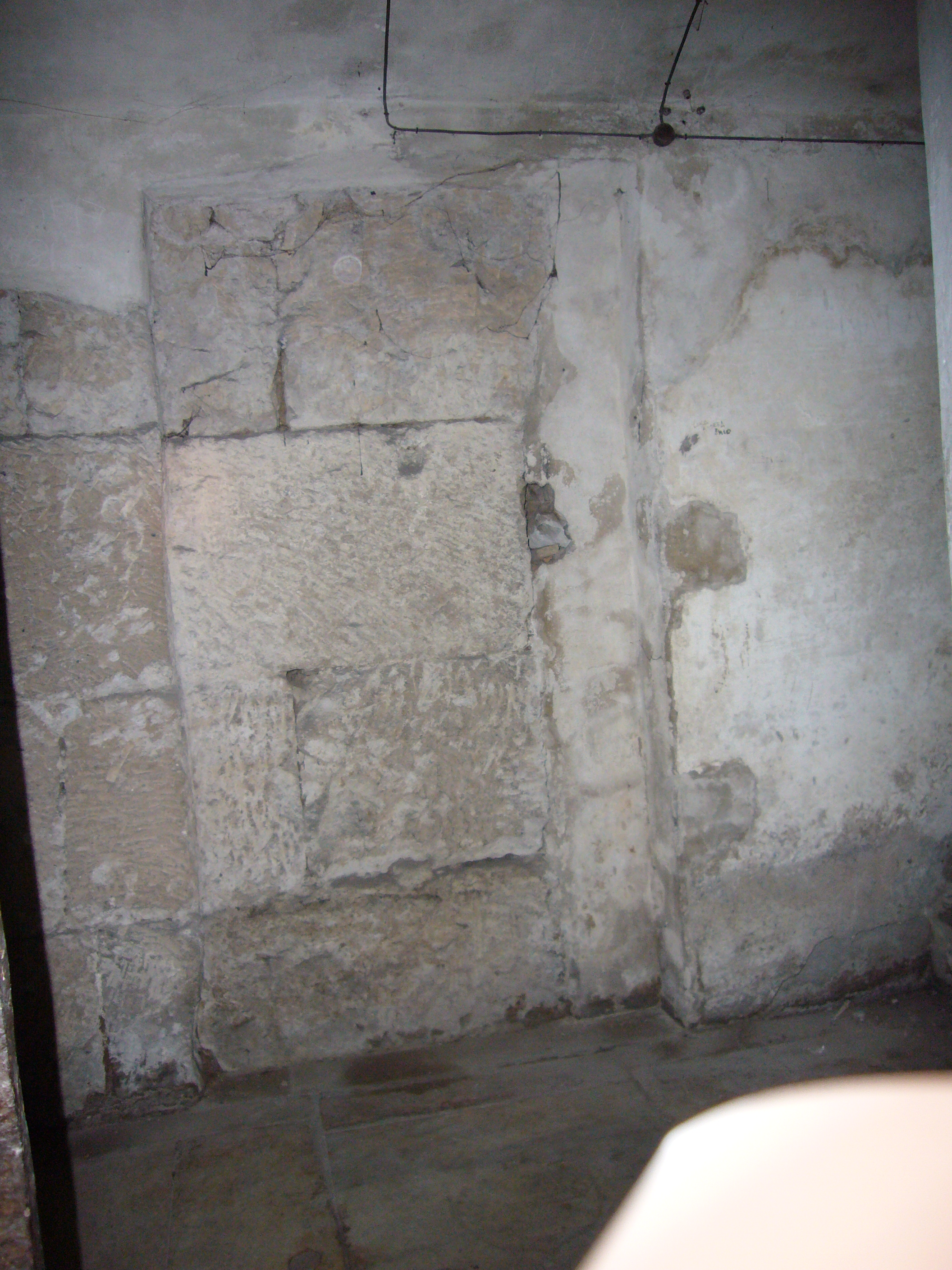 Blocs de tuf correspondant aux murs du podium du Très Grand Autel d'Hercule Invaincu incorporés dans la crypte de Rome Santa Maria in Cosmedin (Rome, Latium, Italie).